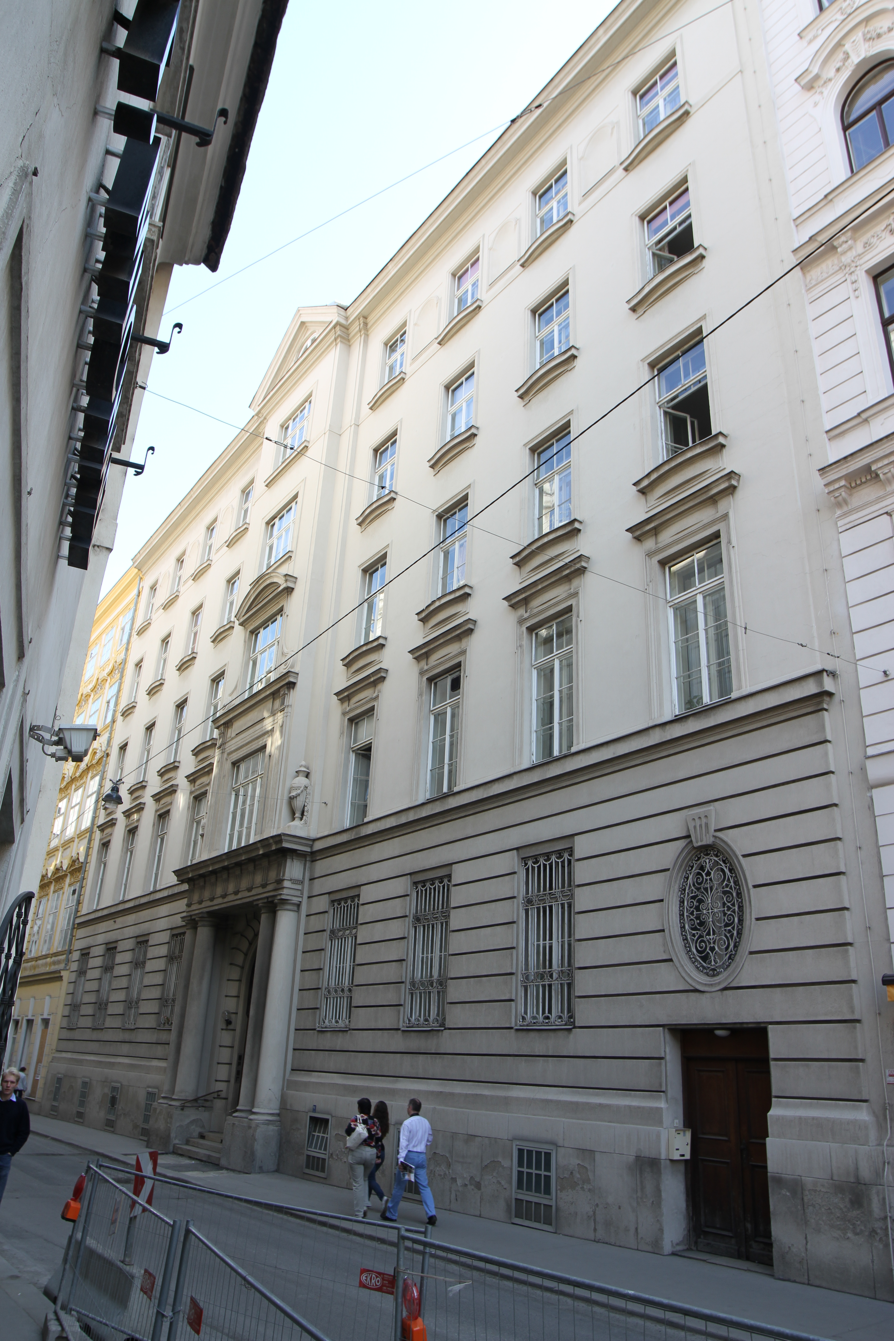 Priesterseminar St. Augustin